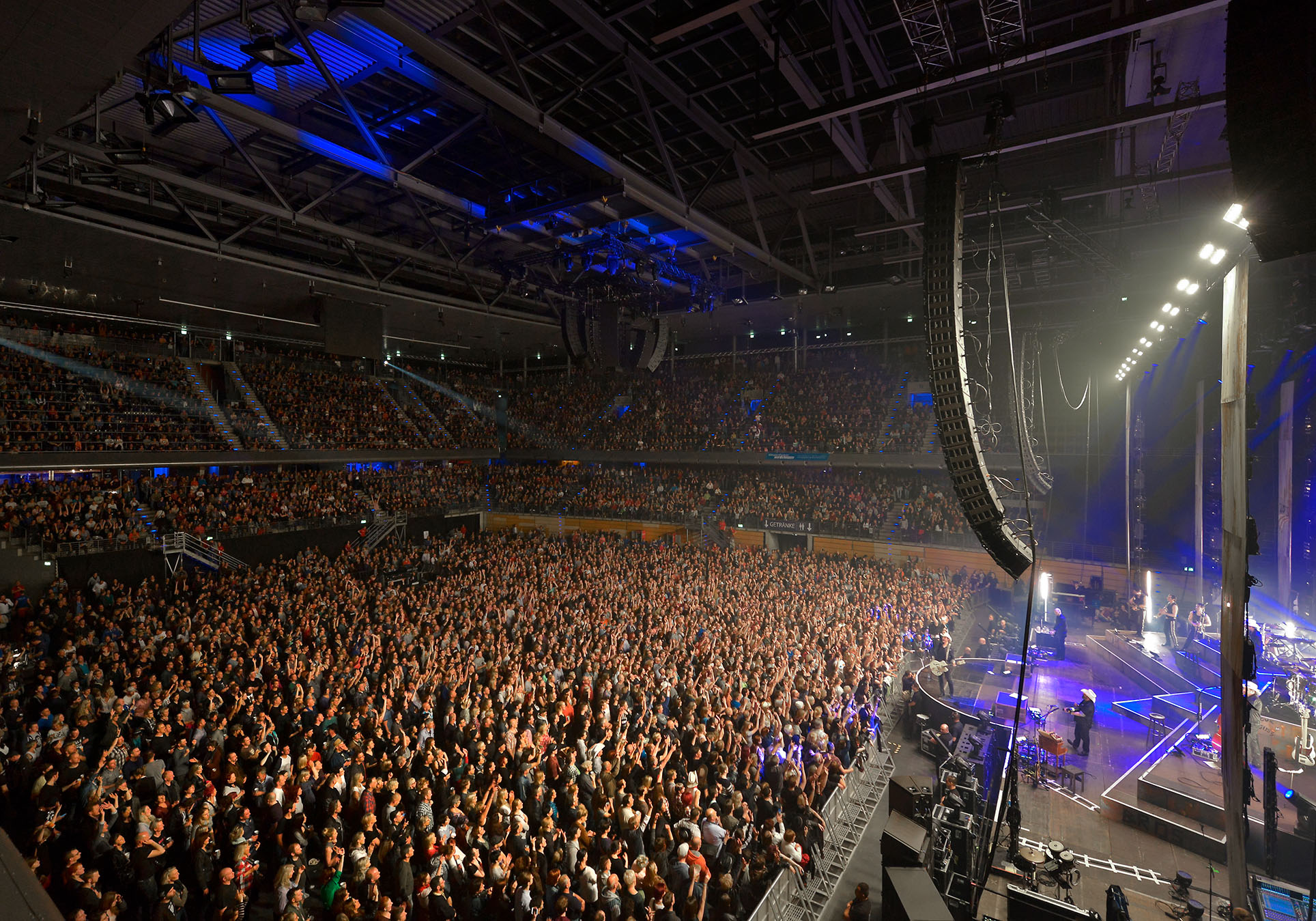 Ansicht der Arena mit Publikum beim Konzert von The Boss Hoss 2016